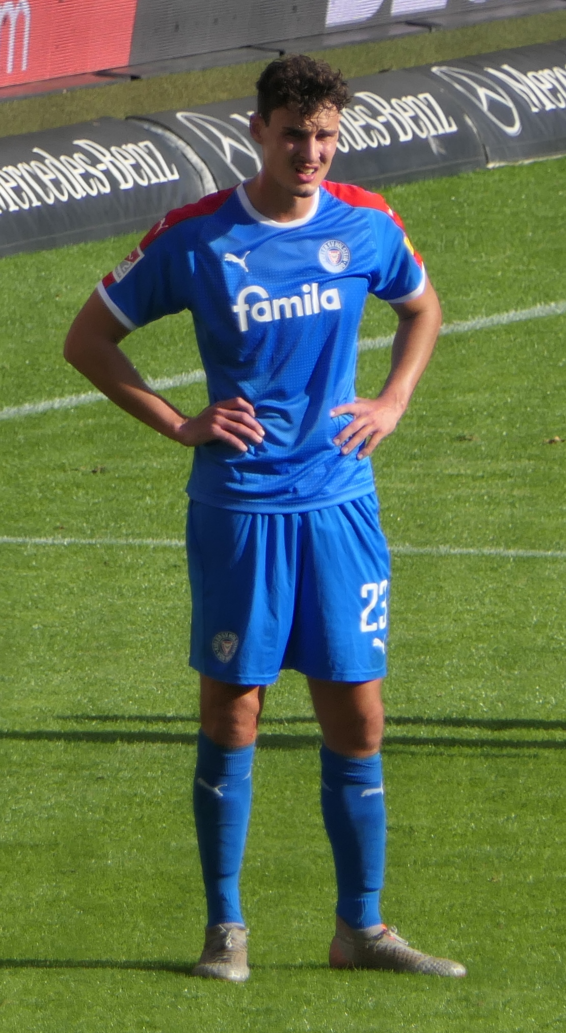 Der Fussballprofi Janni Serra im Trikot von Holstein Kiel beim Auswärtsspiel gegen den VfB Stuttgart am 20.10.2019.